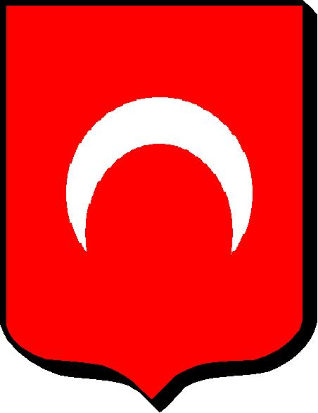 Escut família Pax